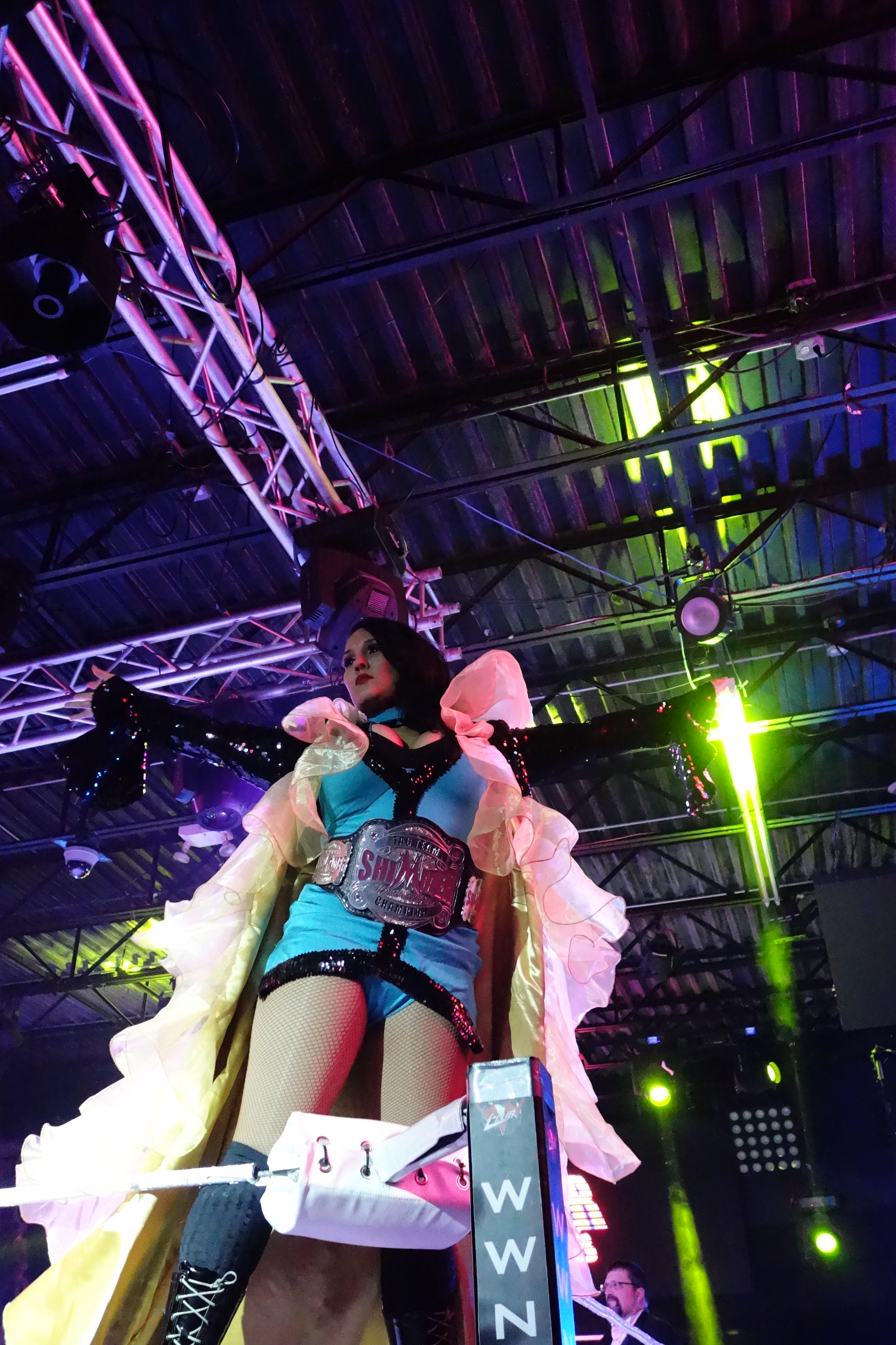 La catcheuse Cheerleader Melissa posant avec la ceinture de championne par équipe de la Shimmer